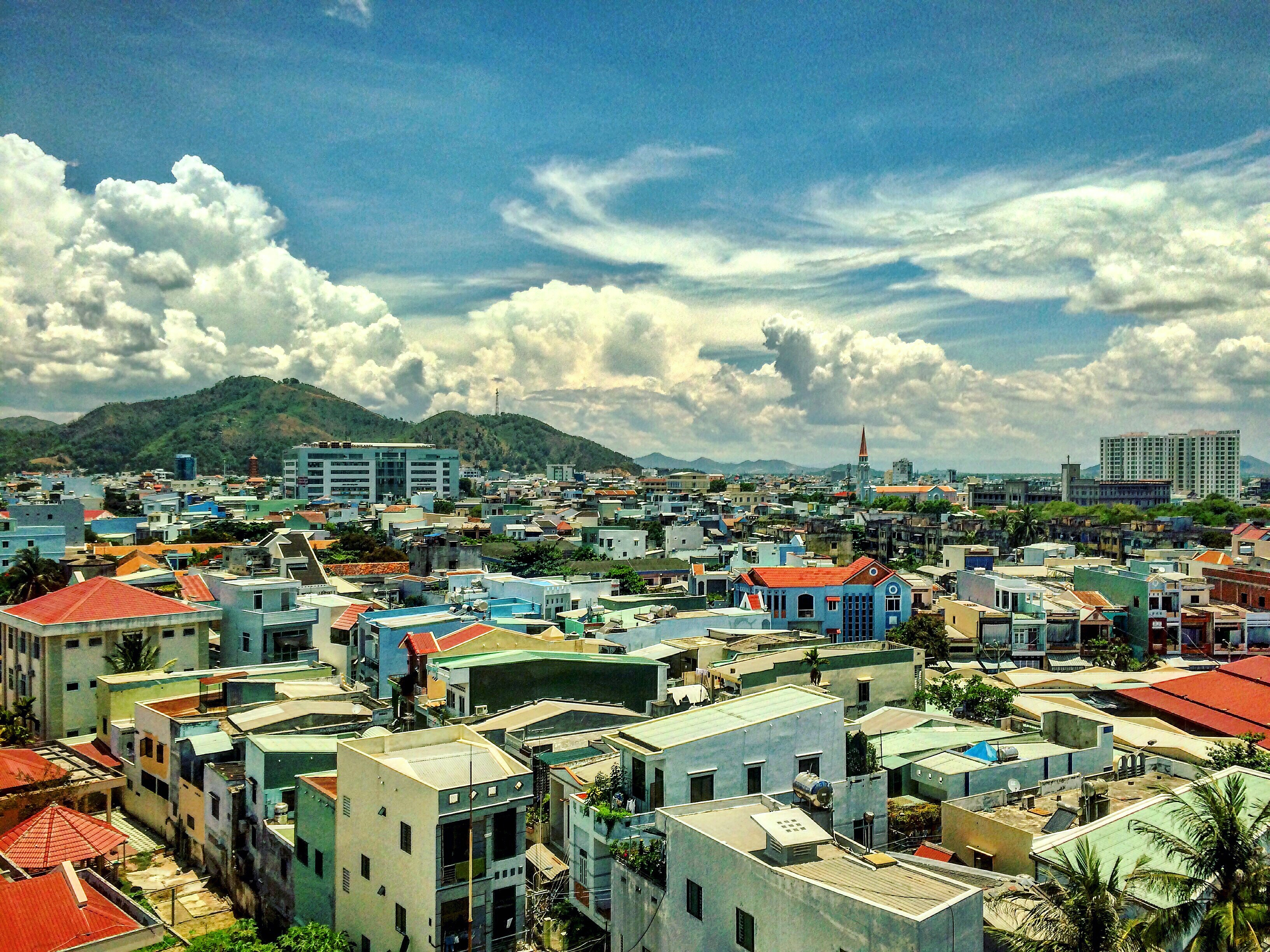 Thành phố Quy Nhơn nhìn từ khách sạn Mường Thanh